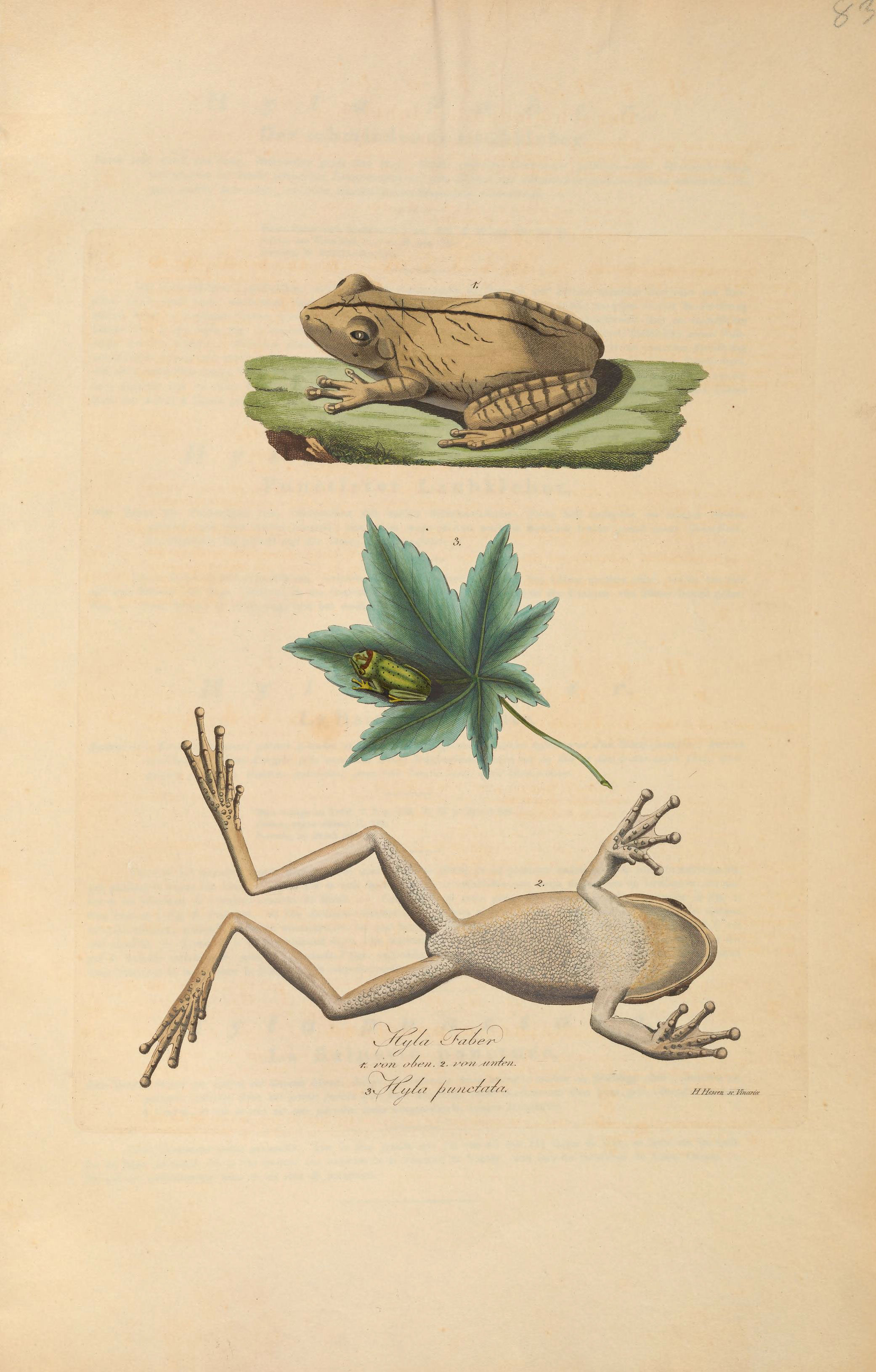 ff . Hetzen jv. 7&w.r.